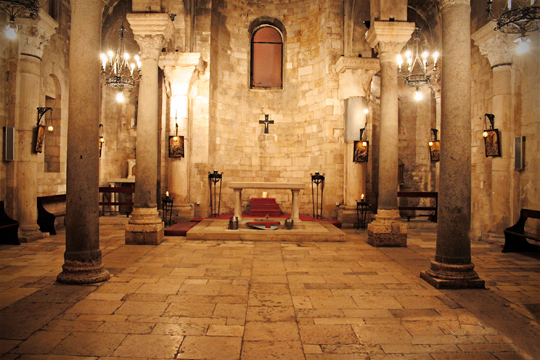 interno ognissanti trani